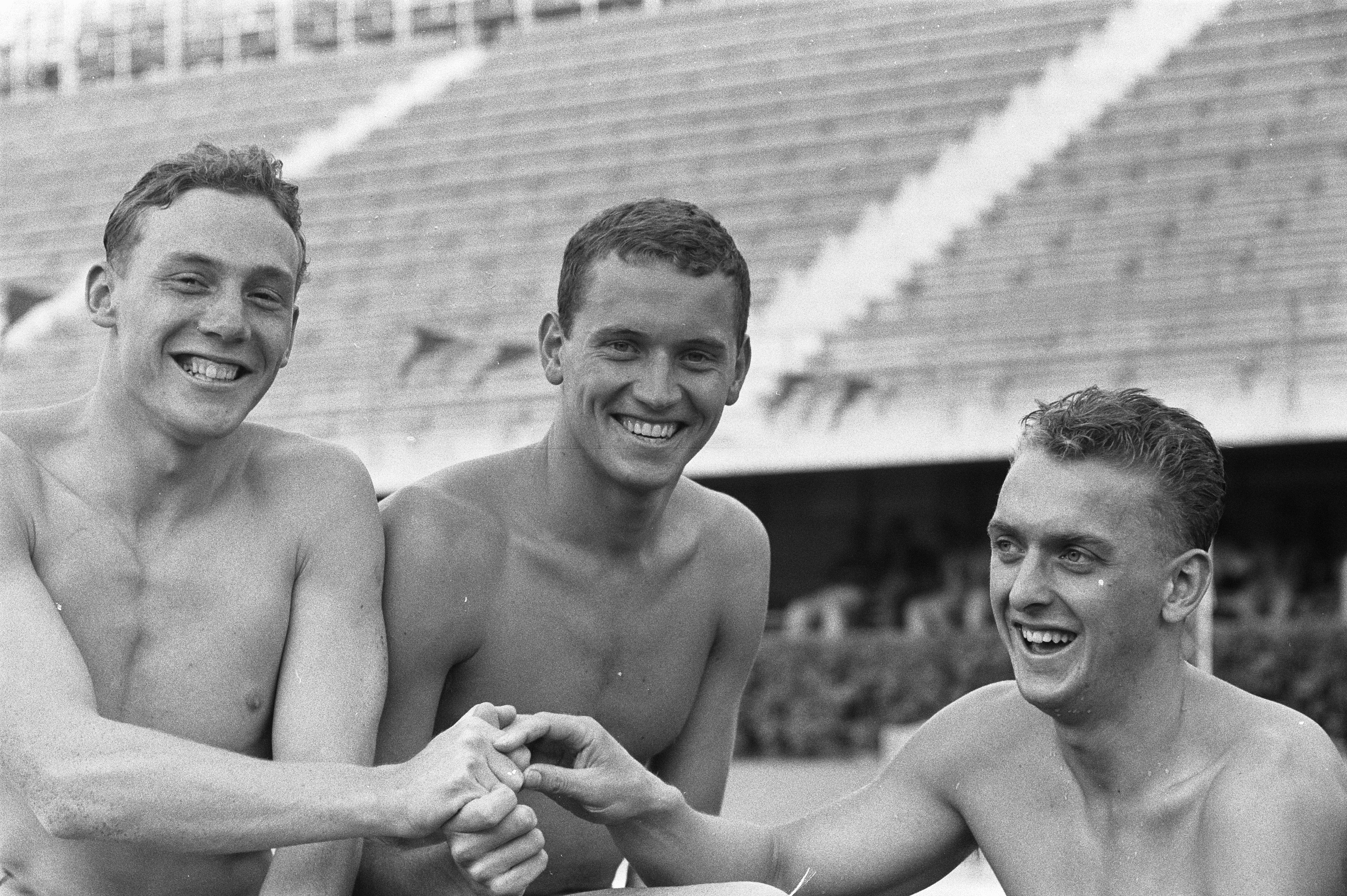 Collectie / Archief : Fotocollectie Anefo Reportage / Serie : [ onbekend ] Beschrijving : Olympische Spelen te Rome, Nederlandse estafette zwemploeg 4 x 100 meter wisselslag verbetert record, v.l.n.r. Jan Jiskoot (rugslag), Gerrit Korteweg (vlinderslag), en Wieger Mensonides (schoolslag) Datum : 11 september 1960 Locatie : Italië, Rome Trefwoorden : sport, zwemmen Persoonsnaam : Jiskoot, Jan, Korteweg, Gerrit, Mensonides, Wieger Instellingsnaam : Olympische Spelen Fotograaf : Pot, Harry / Anefo Auteursrechthebbende : Nationaal Archief Materiaalsoort : Negatief (zwart/wit) Nummer archiefinventaris : bekijk toegang 2.24.01.05 Bestanddeelnummer : 911-5848